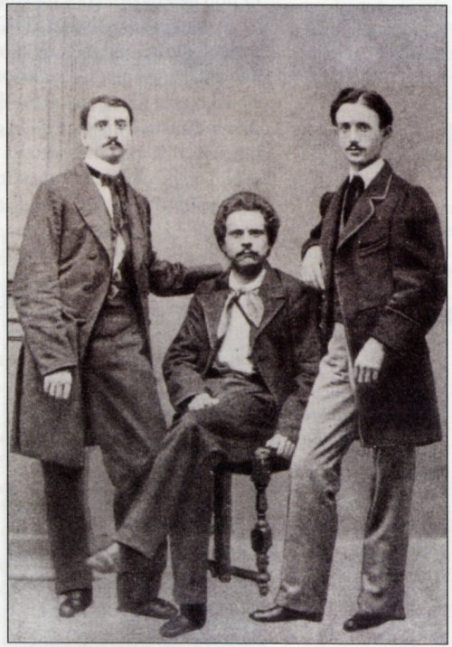 Gli "amici pedanti" Torquato Gargani, Giosue Carducci, Giuseppe Chiarini. Manca Ottavio Targioni Tozzetti.